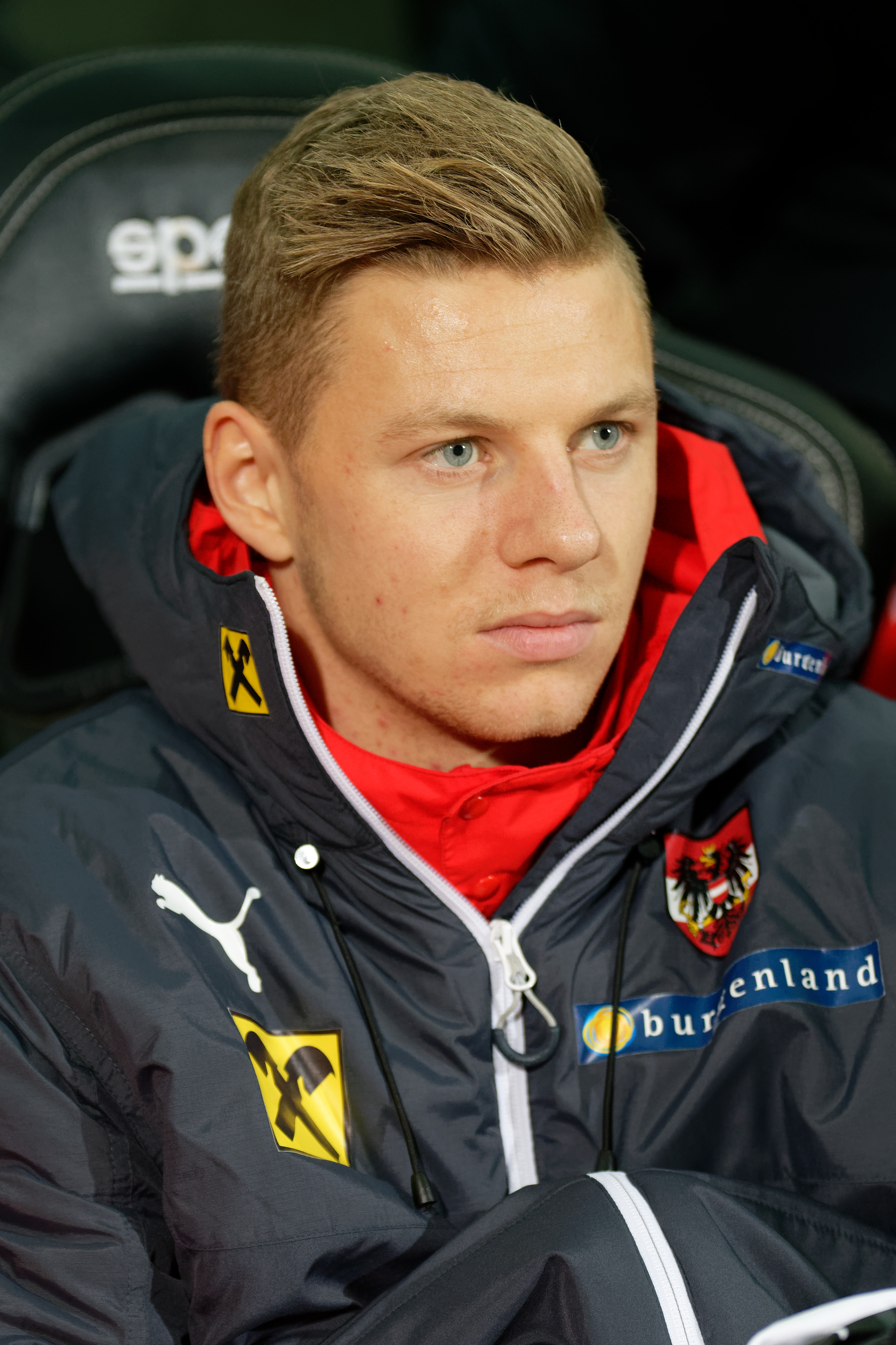 U21 Europameisterschaftsqualifikationsspiel Österreich gegen Serbien am 11.10.2017 in der BSFZ-Arena Maria Enzersdorf. Bild zeigt: Maximilian Ullmann